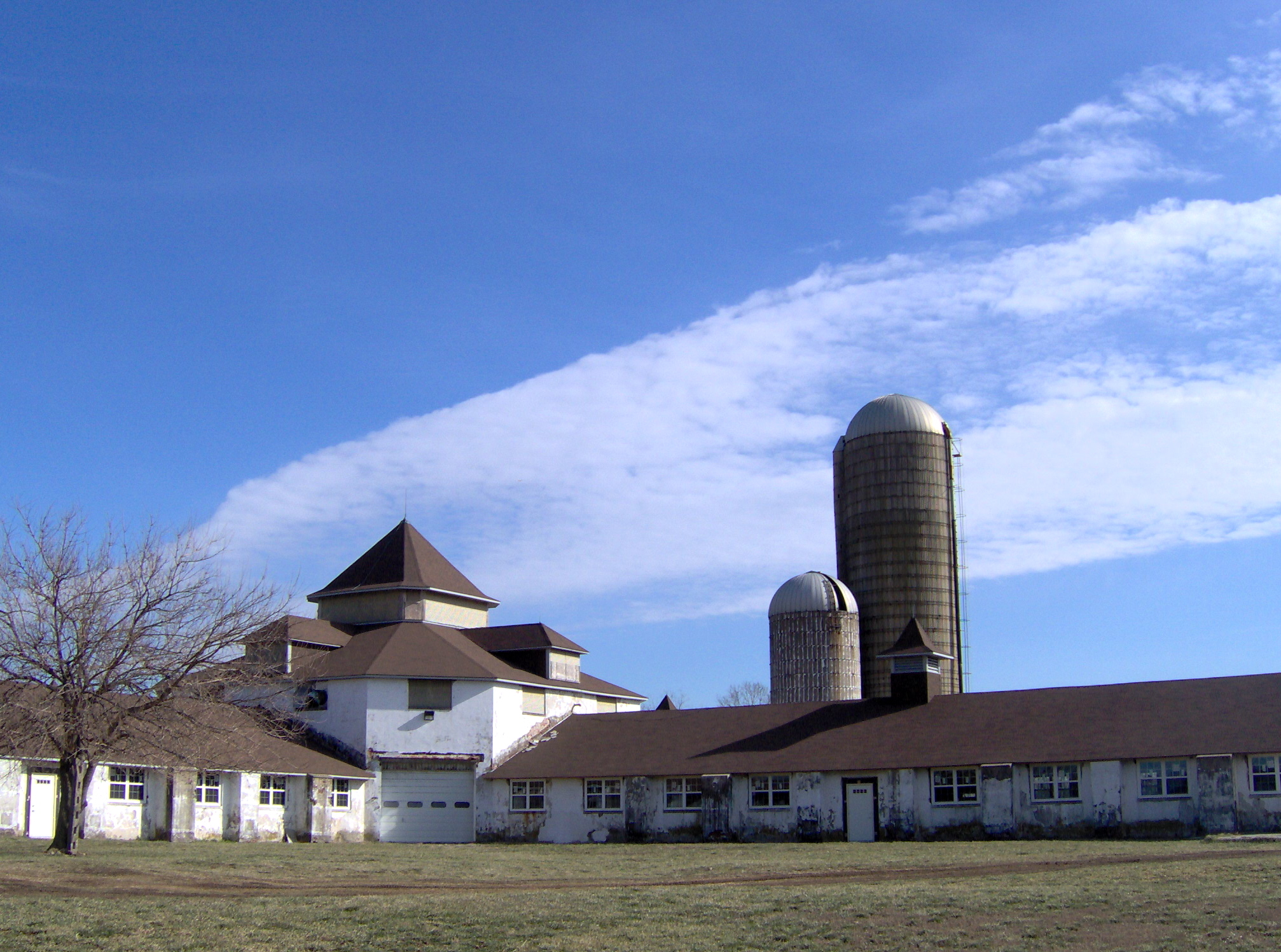 Im000164.Jpg